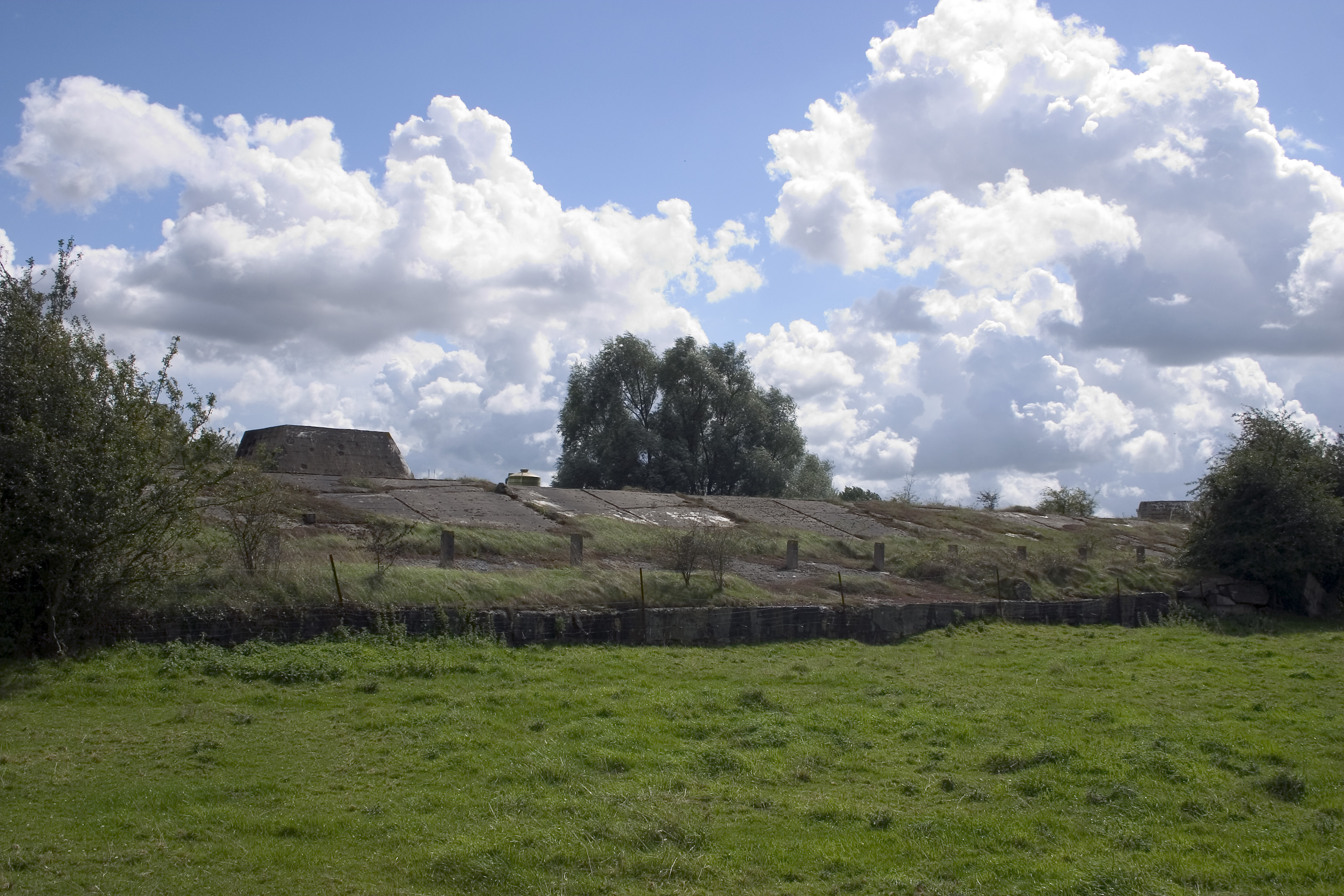 le blockhauss de Siracourt